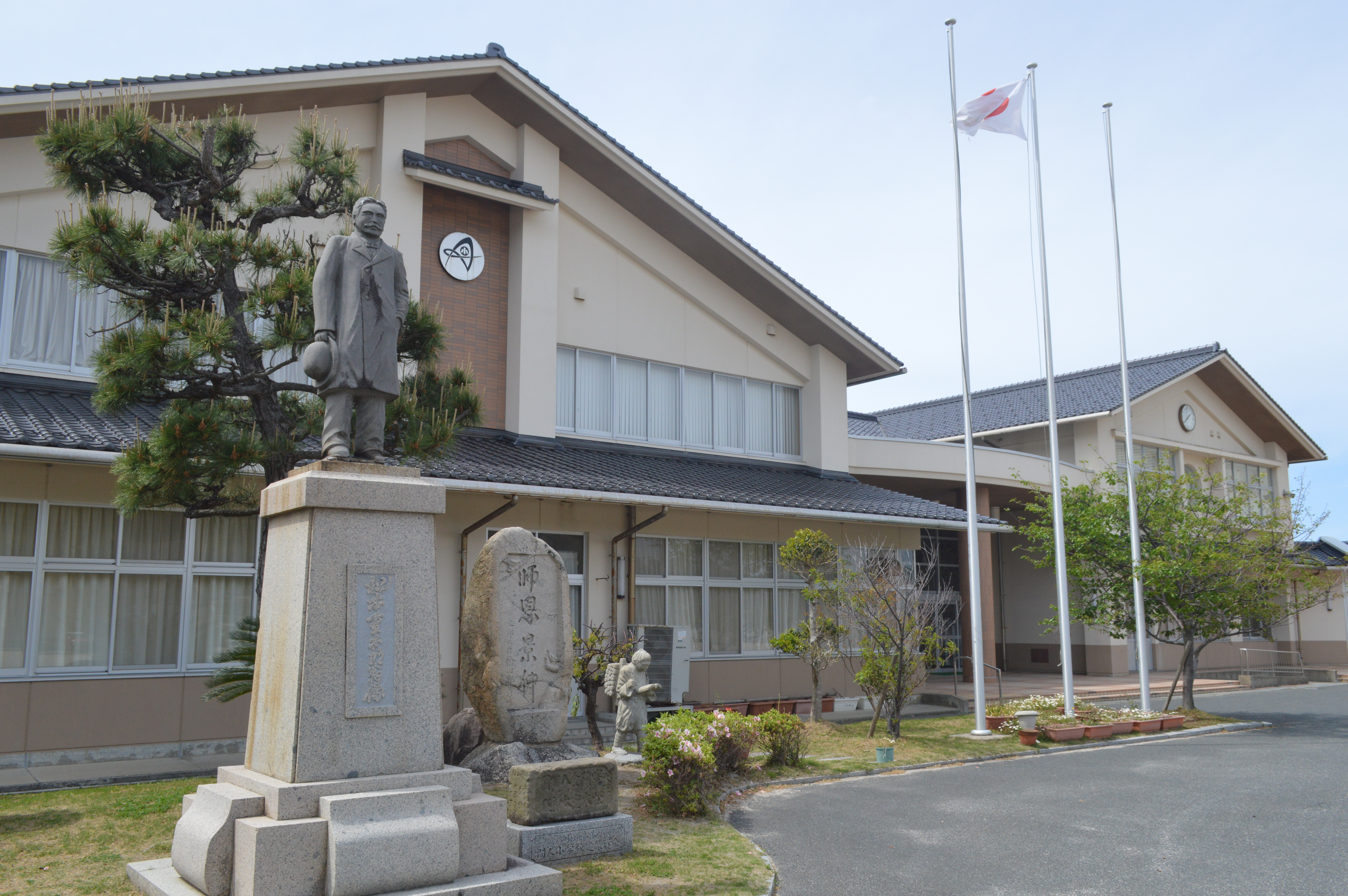 京都府京丹後市丹後町間人にある京丹後市立丹後小学校。